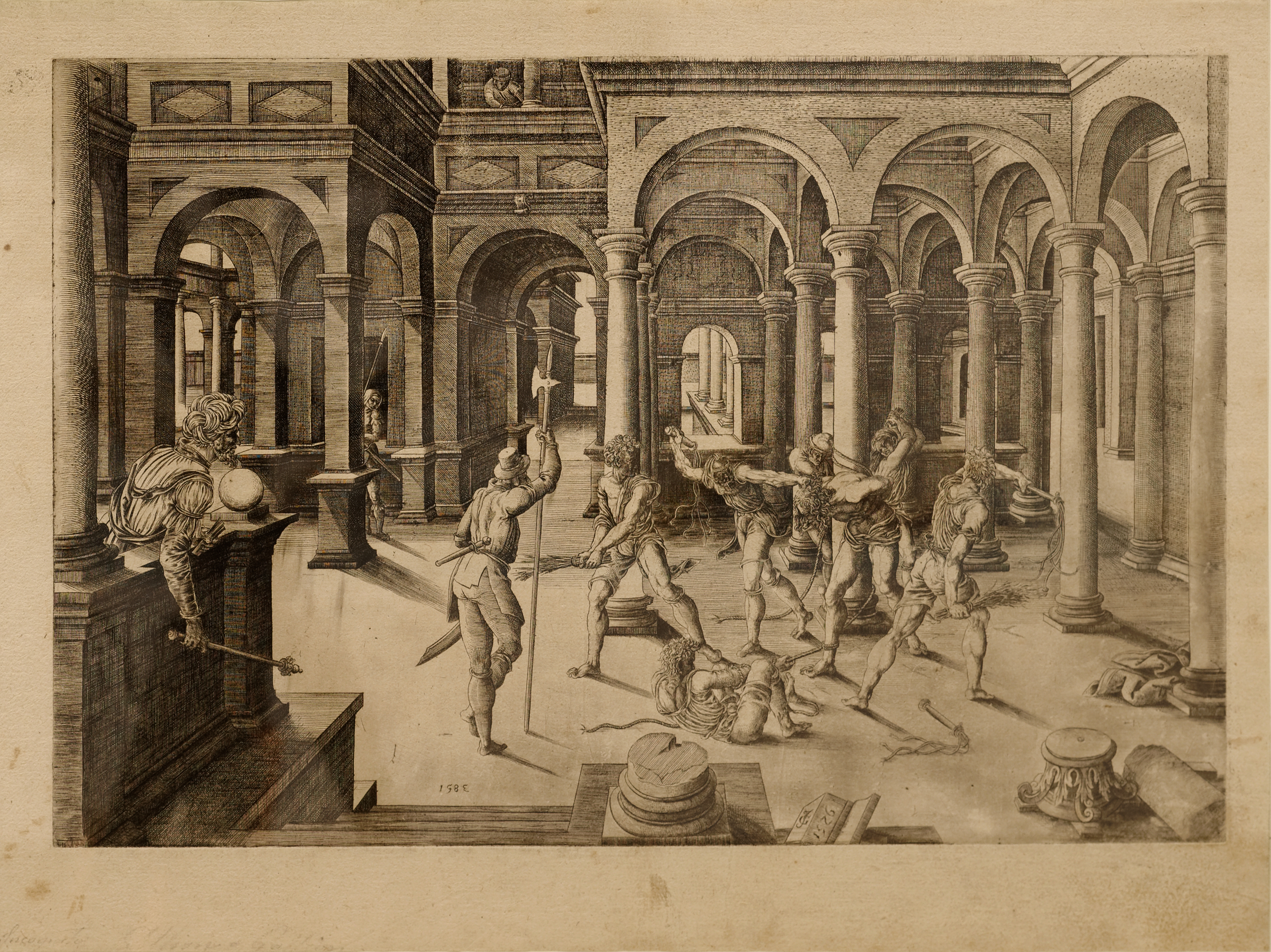 Maître J.G.(Jacques Gauvain, connu à Lyon de 1517 à 1547), La Flagellation. 1526, 2e état